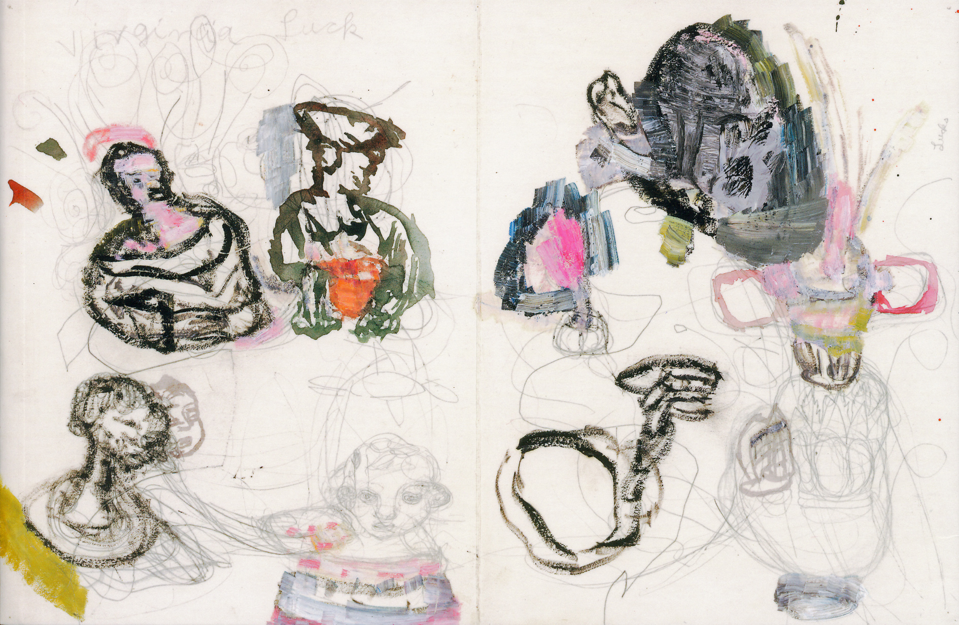 Annette Lucks_Virginia Luck/Amerikanische Zeichnung_2007_Öl auf Papier_32x45 cm